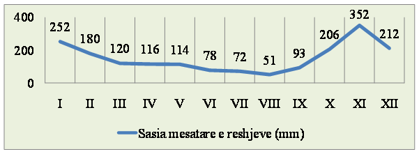 Sasia e reshjeve